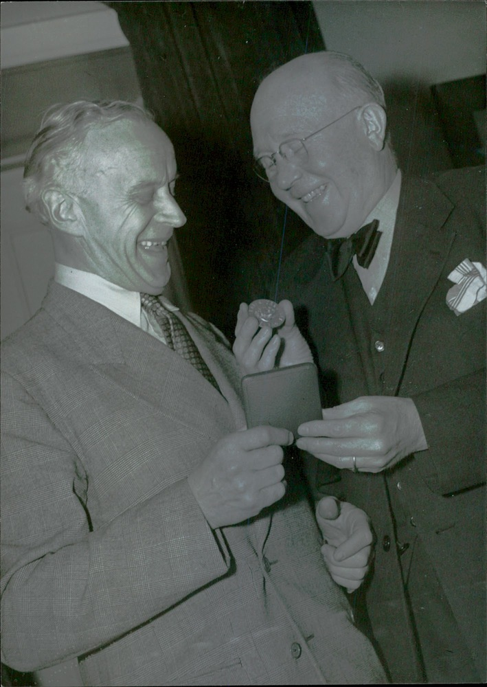 Ur Svenska Dagbladet 1949-05-19: "Avgående ordföranden Anders Henrikson visar sin medalj för efterträdaren Rune Carlsten. Förste regissör Rune Carlsten blev Svenska teaterförbundets nye ordförande vid förbundets ordinarie årsstämma på onsdagen. Han valdes med acklamation, sedan den tidigare ordföranden Anders Henrikson och likaledes den till nyval nominerade Edwin Adolphson avsagt sig."